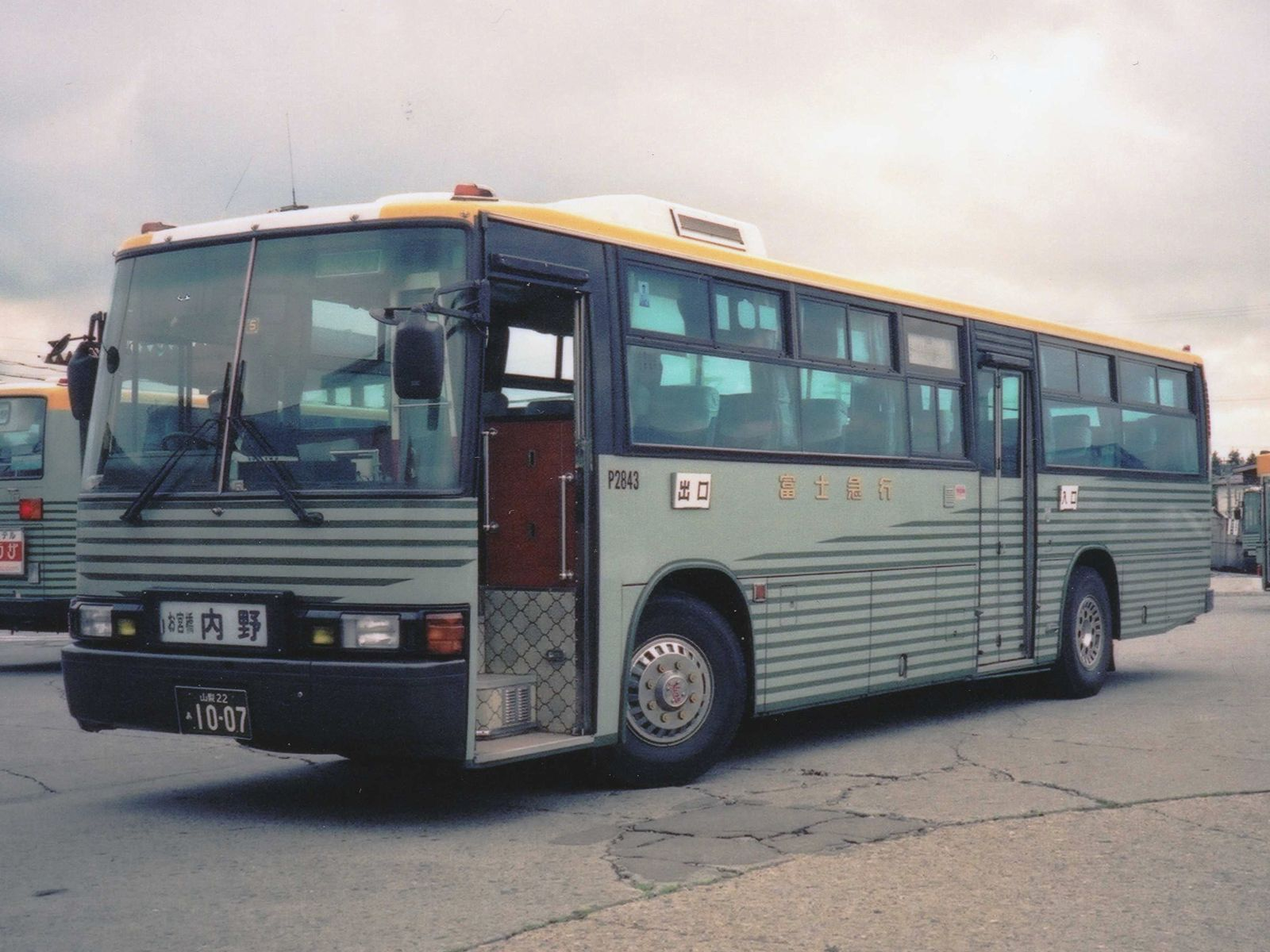 Fujikyu P2843 "One-Roma" Hino P-HU276BA